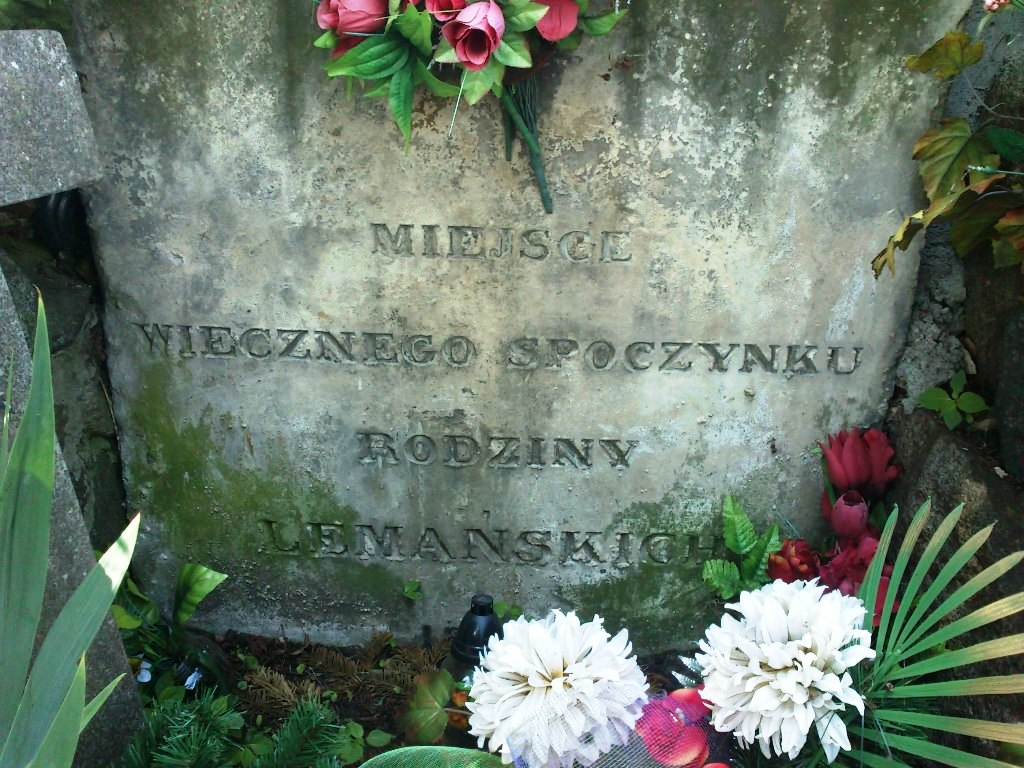 grobowiec rodziny Lemańskich z Bratoszewic